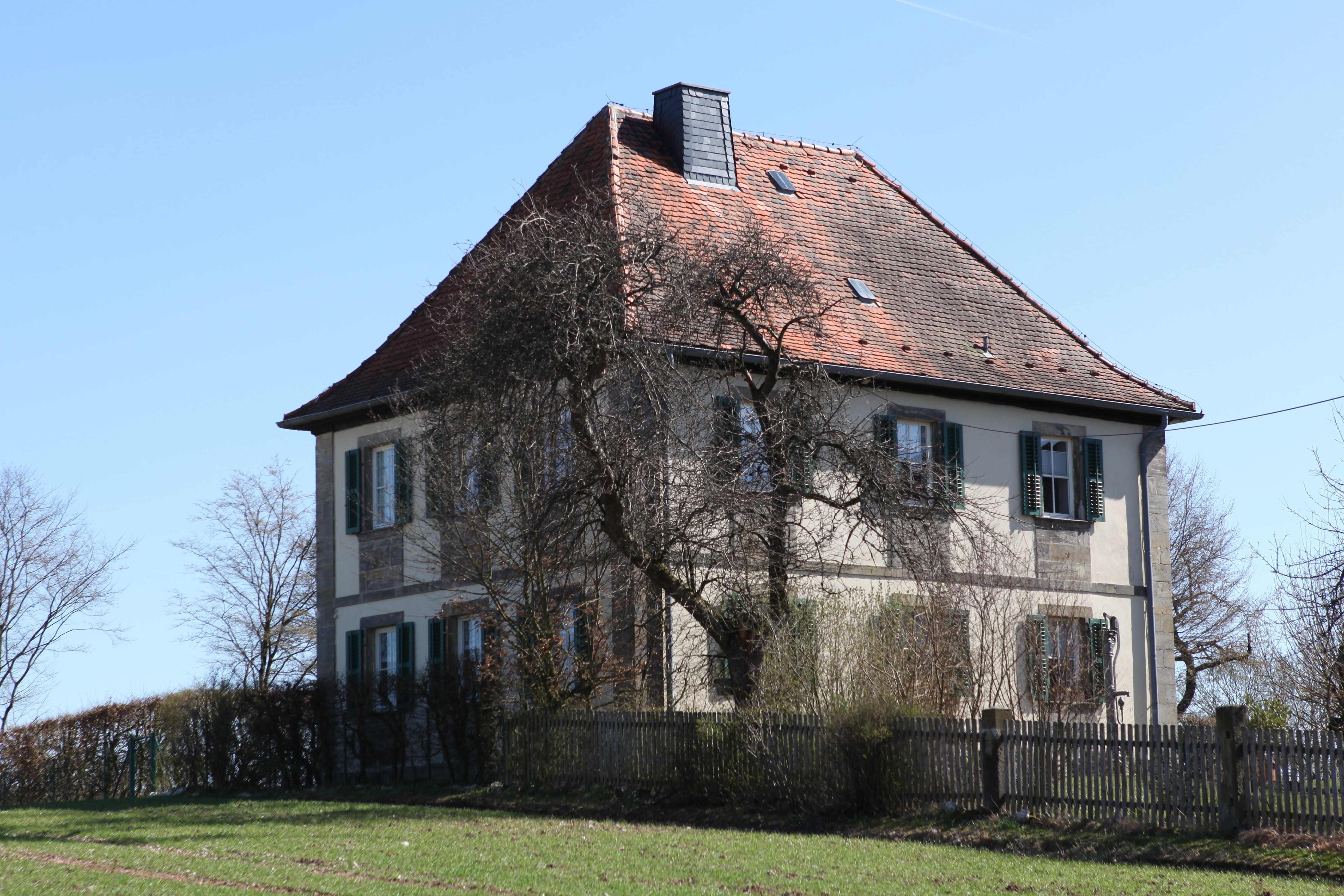 ehemaliges Forsthaus (um 1800) in Gleisenau bei Forsthub (OT von Grub am Forst) in Oberfranken